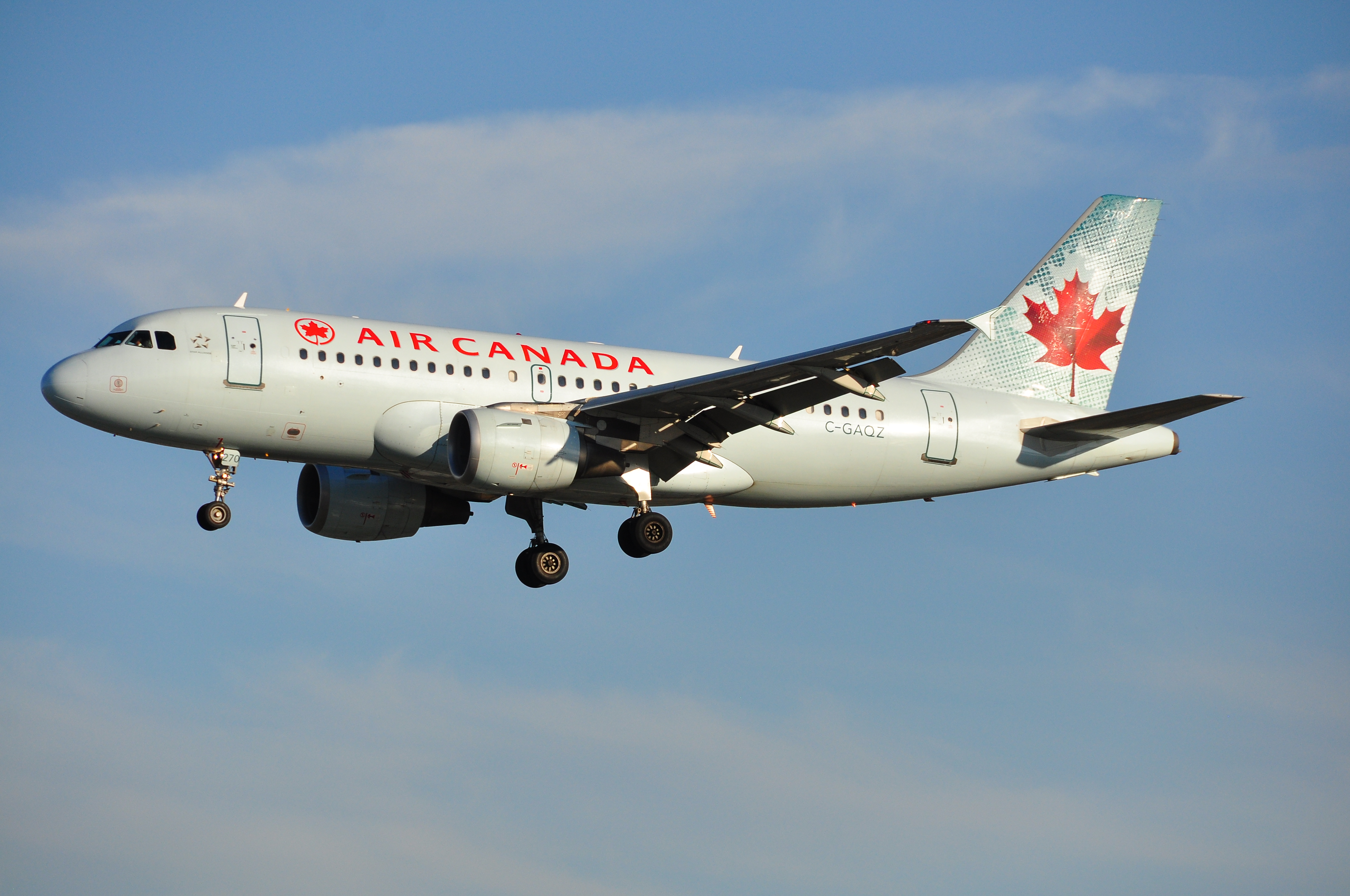 approche de la piste 06 droite - Montréal-Trudeau (YUL)